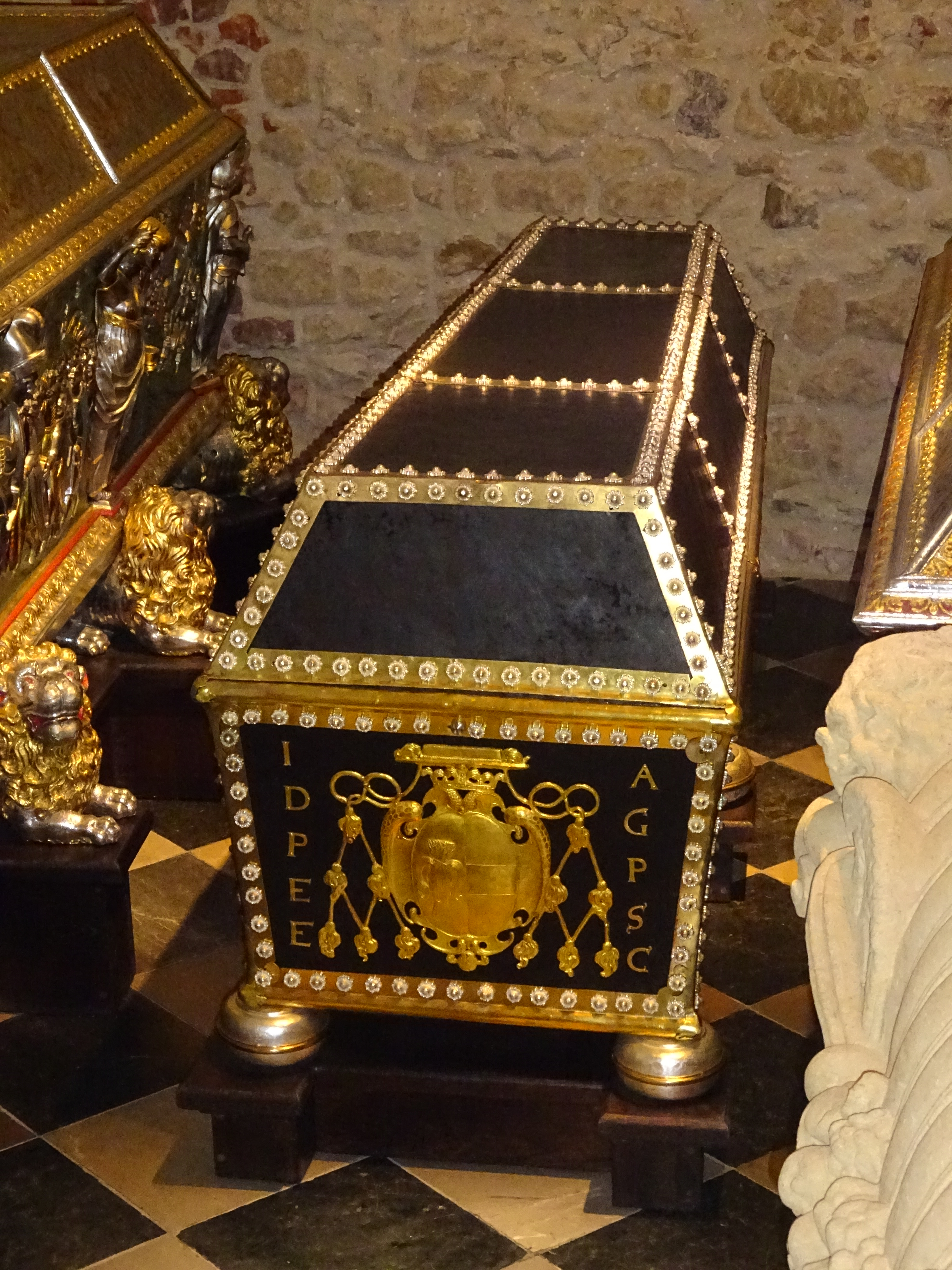 Sarkofag Kardynała Jana Alberta Wazy w Katedrze Wawelskiej po odnowieniu w grudniu 2018